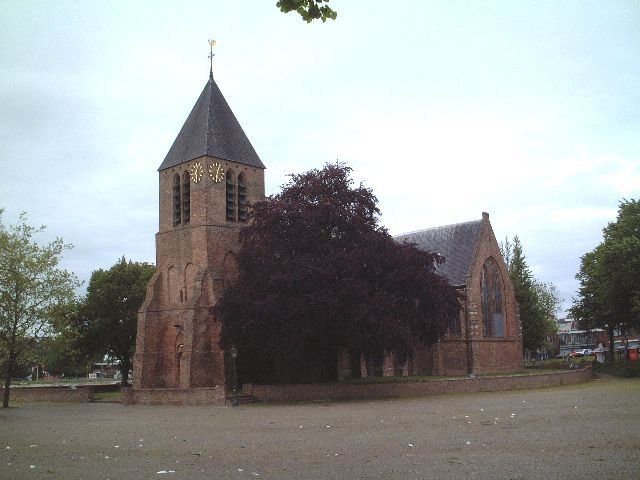 Exterieur Dorpskerk Spijkenisse